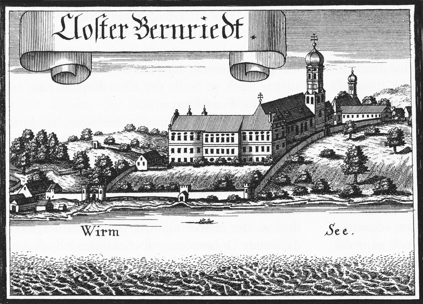 Augustiner-Chorherrenstift Bernried, Kupferstich von Michael Wening um 1700.